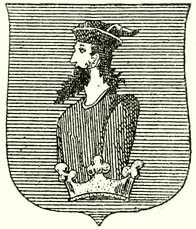 MÁRKI SÁNDOR DÓSA GYÖRGY 1470-1514 A MAGYAR TUDOMÁNYOS AKADÉMIA SEGÉLYEZÉSÉVEL KIADJA A MAGYAR TÖRTÉNELMI TÁRSULAT SZERKESZTI DR. DÉZSI LAJOS BUDAPEST AZ ATHENAEUM R.-T. KÖNYVNYOMDÁJA 1913